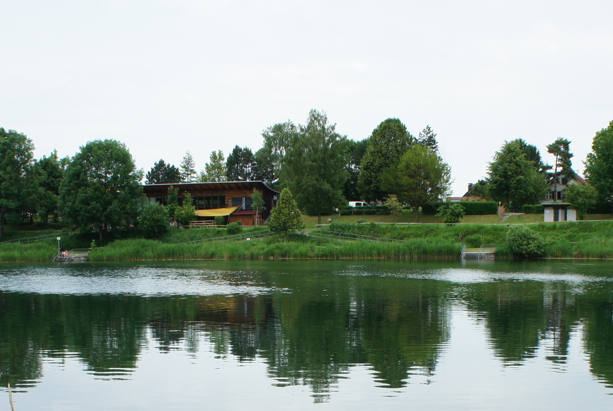 S Bruggerloch mit em Restorant Bruggerhorn.